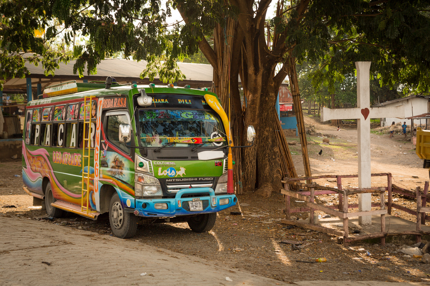 Microlet em curso do Mercado de Balibo